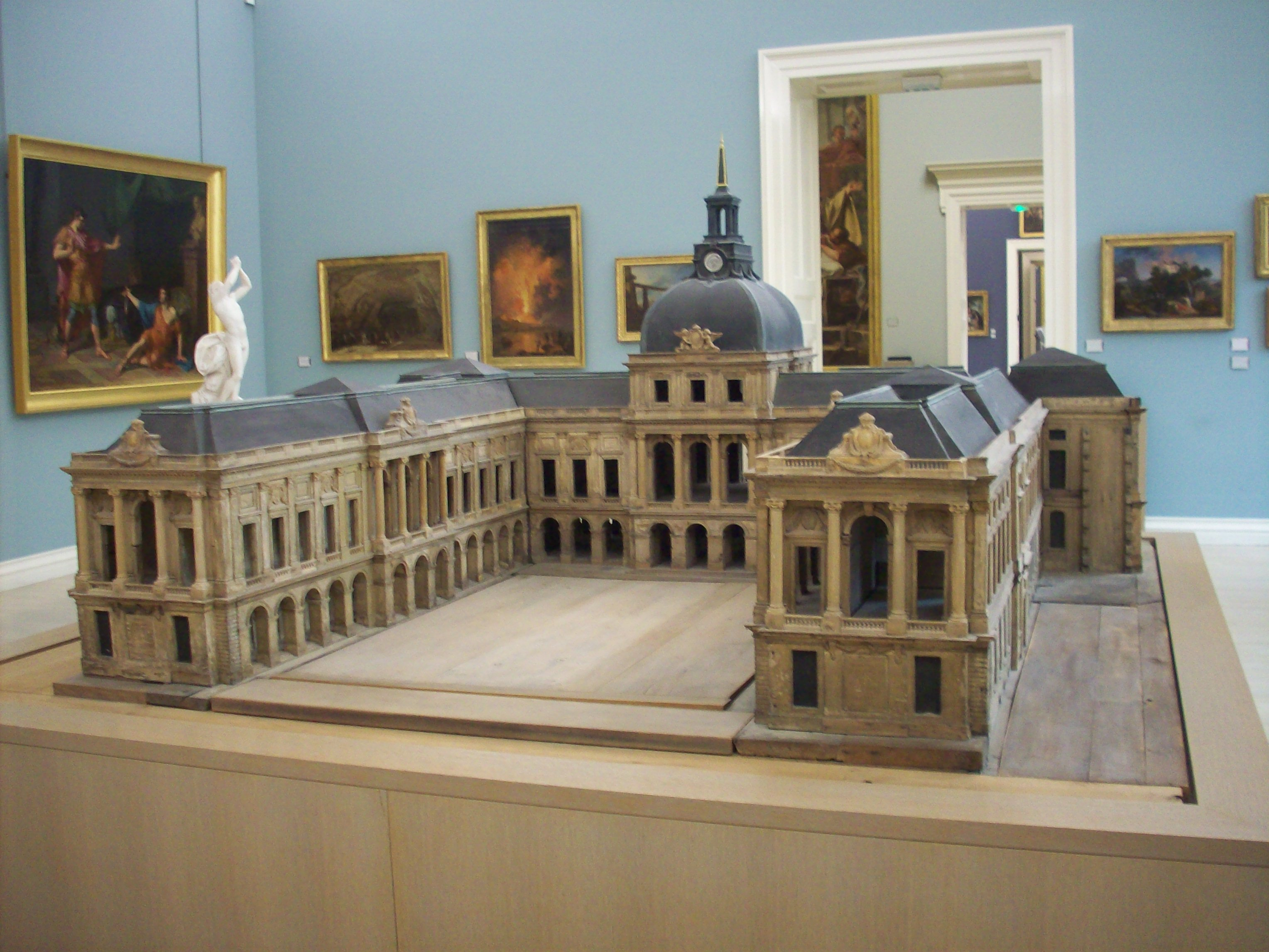 Maquette en chêne de l'Hôtel de ville de Rouen, réalisée par Drouin en 1758. L'architecte Le Carpentier la donne à la ville de Rouen en 1760. Elle est affectée au musée des Beaux-Arts de Rouen en 1912.